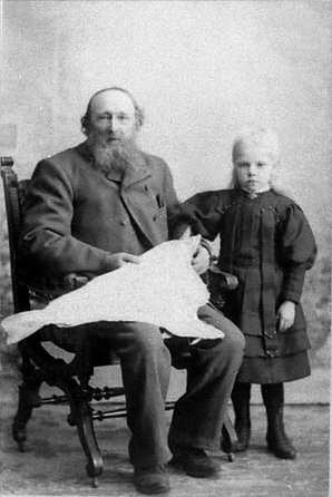 Bildet er av Jørgen Erichsen Ohrvik, f. 6. august 1834 og barnebarnet Guraa, f. 14. mai 1899.